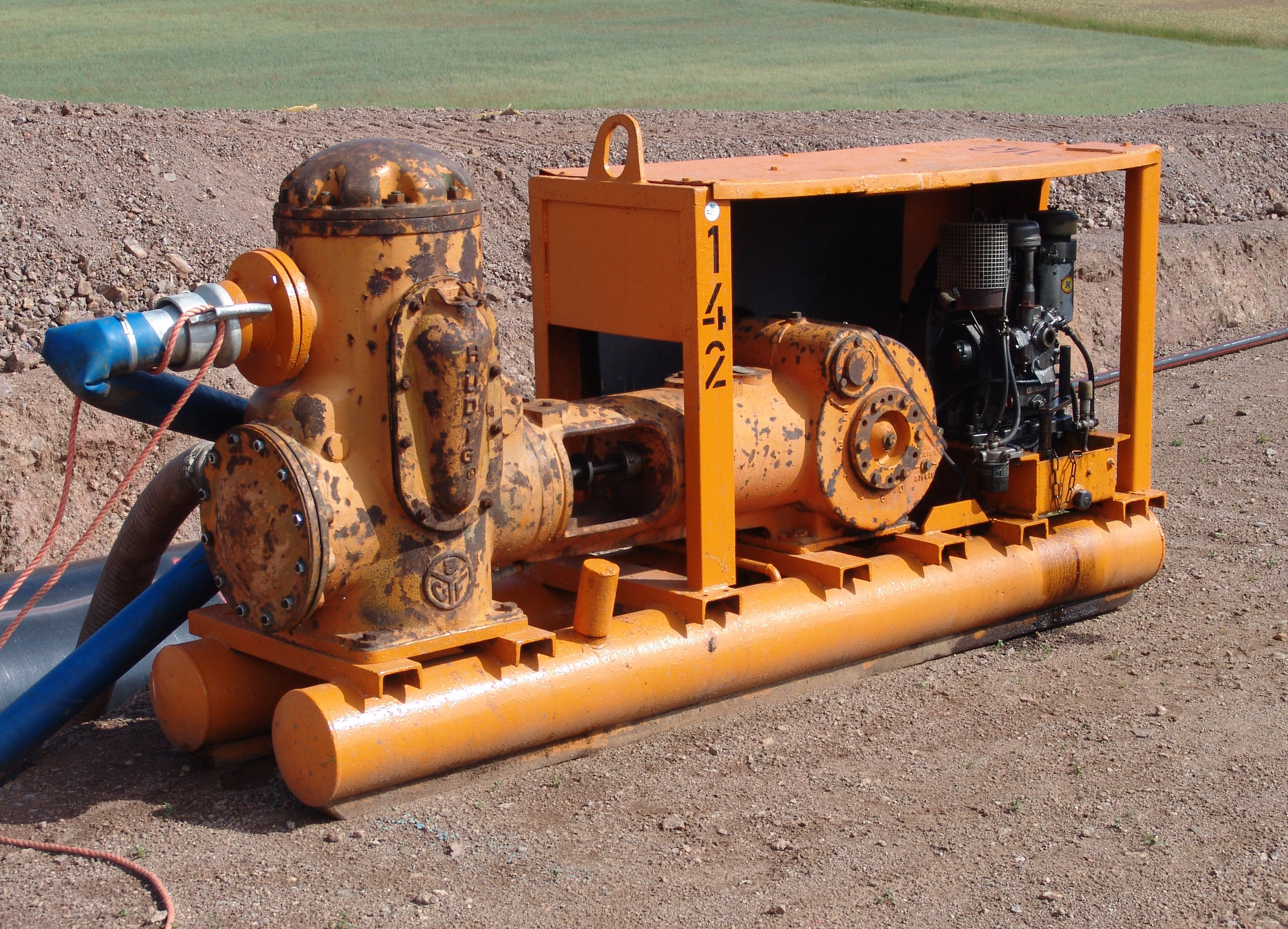 Dieselpumpe zur Wasserhaltung auf Baustellen